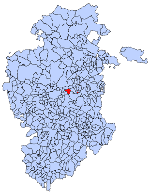 Municipio de Atapuerca, en Burgos (España)